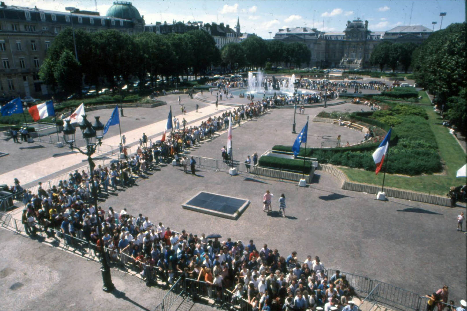 Réouverture BA 10 06 97 (Photo VDN)